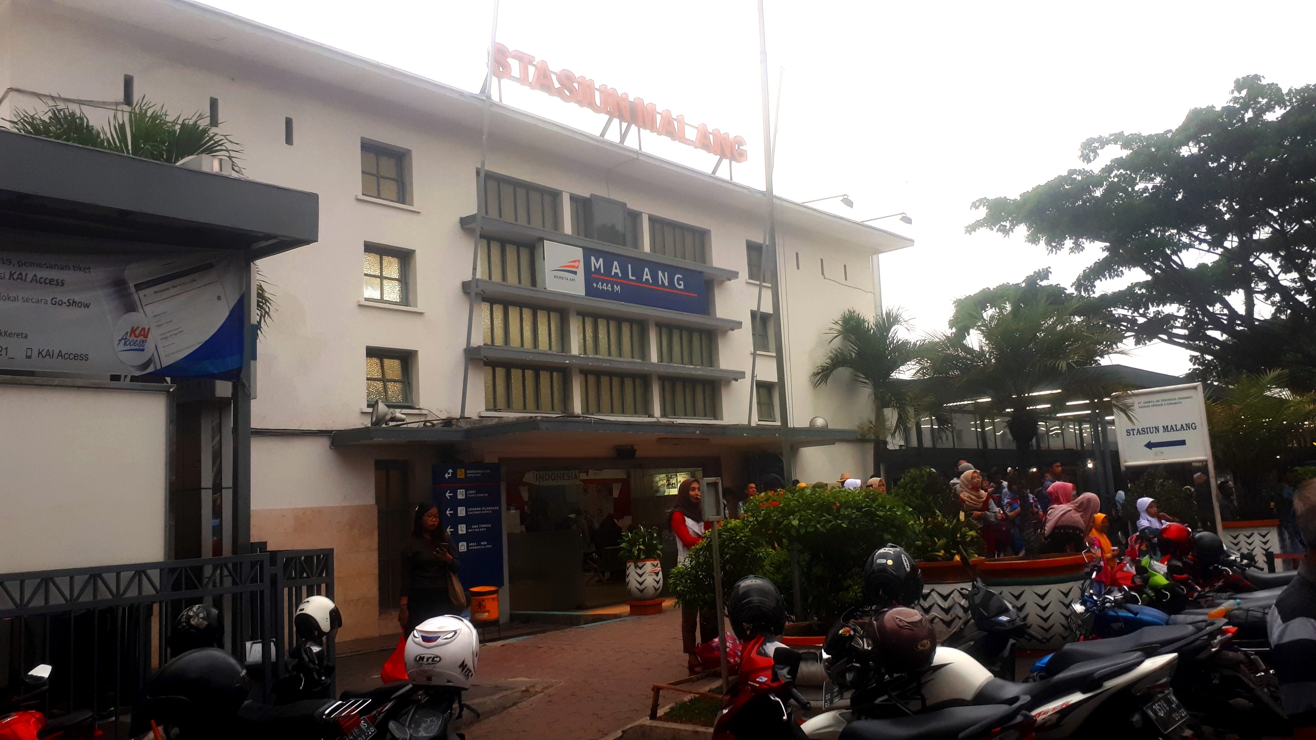 Muka depan Stasiun Malang (2019).